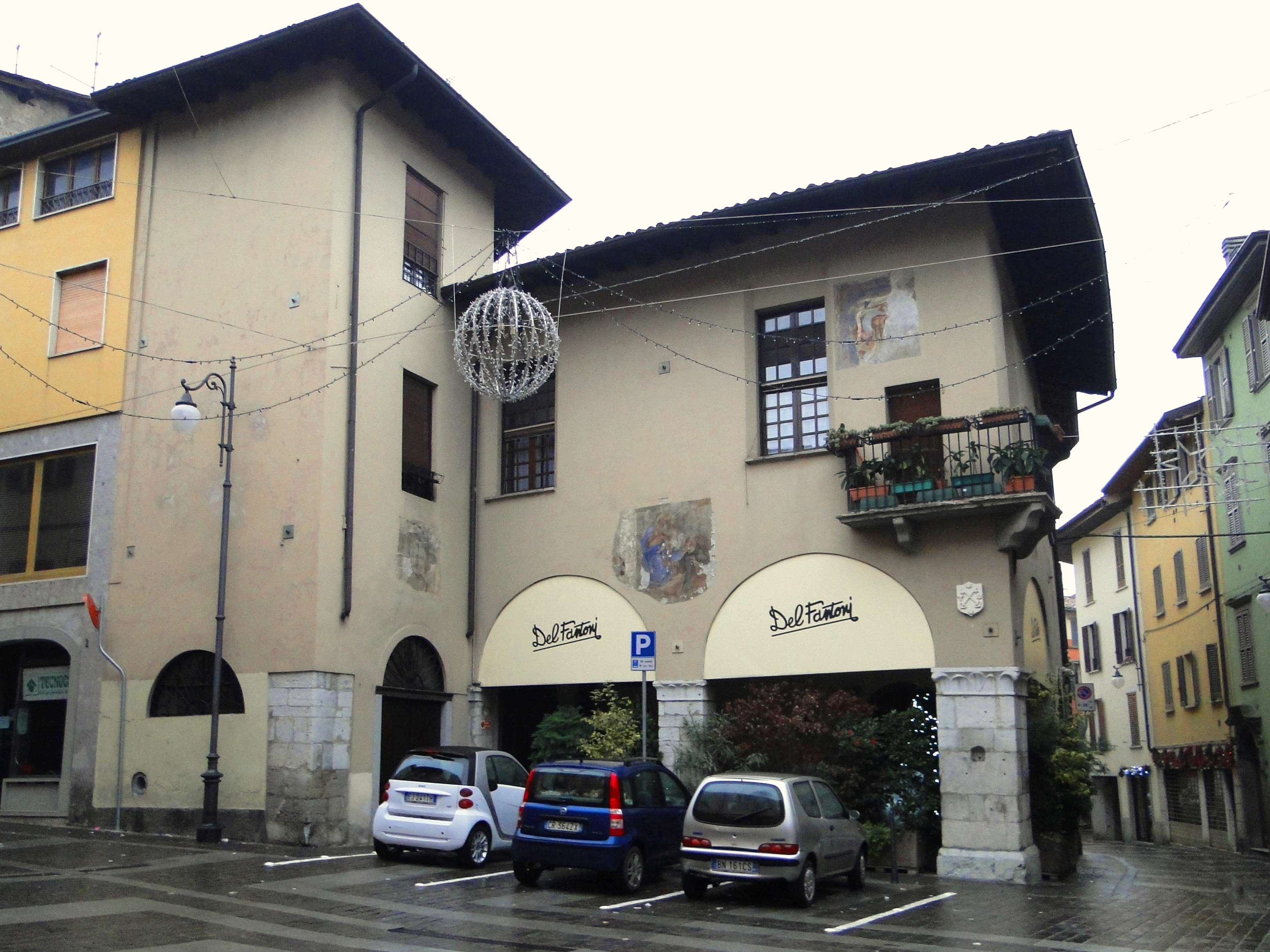 Alzano Lombardo (BG), centro storico. Edificio denominato in età medievale Palazzo della ragione